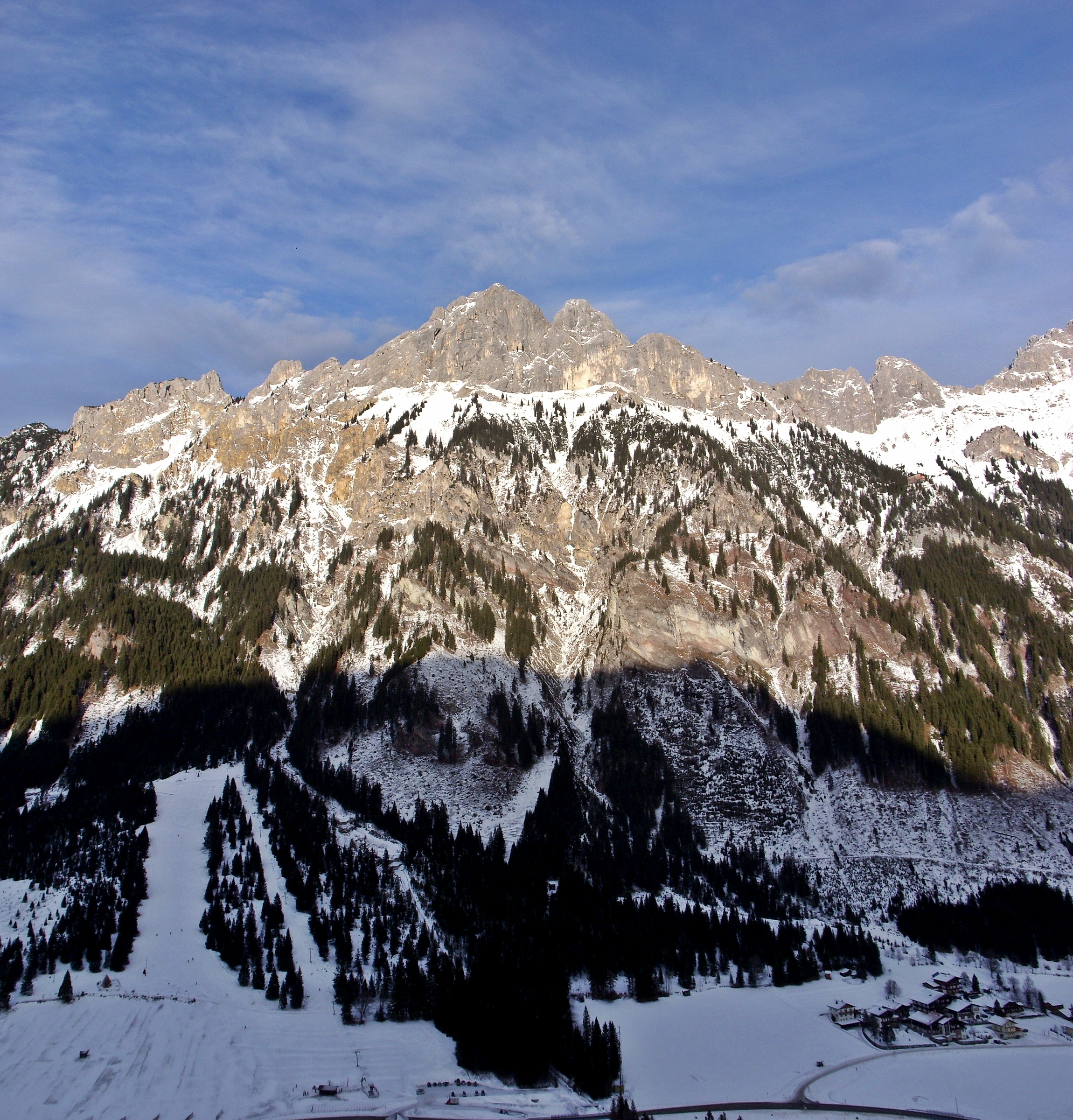 Gesamtaufnahme des Berges Rote Flüh vom Mittelteil der Doppelsesselbahn Krinnenalpe aus gesehen.